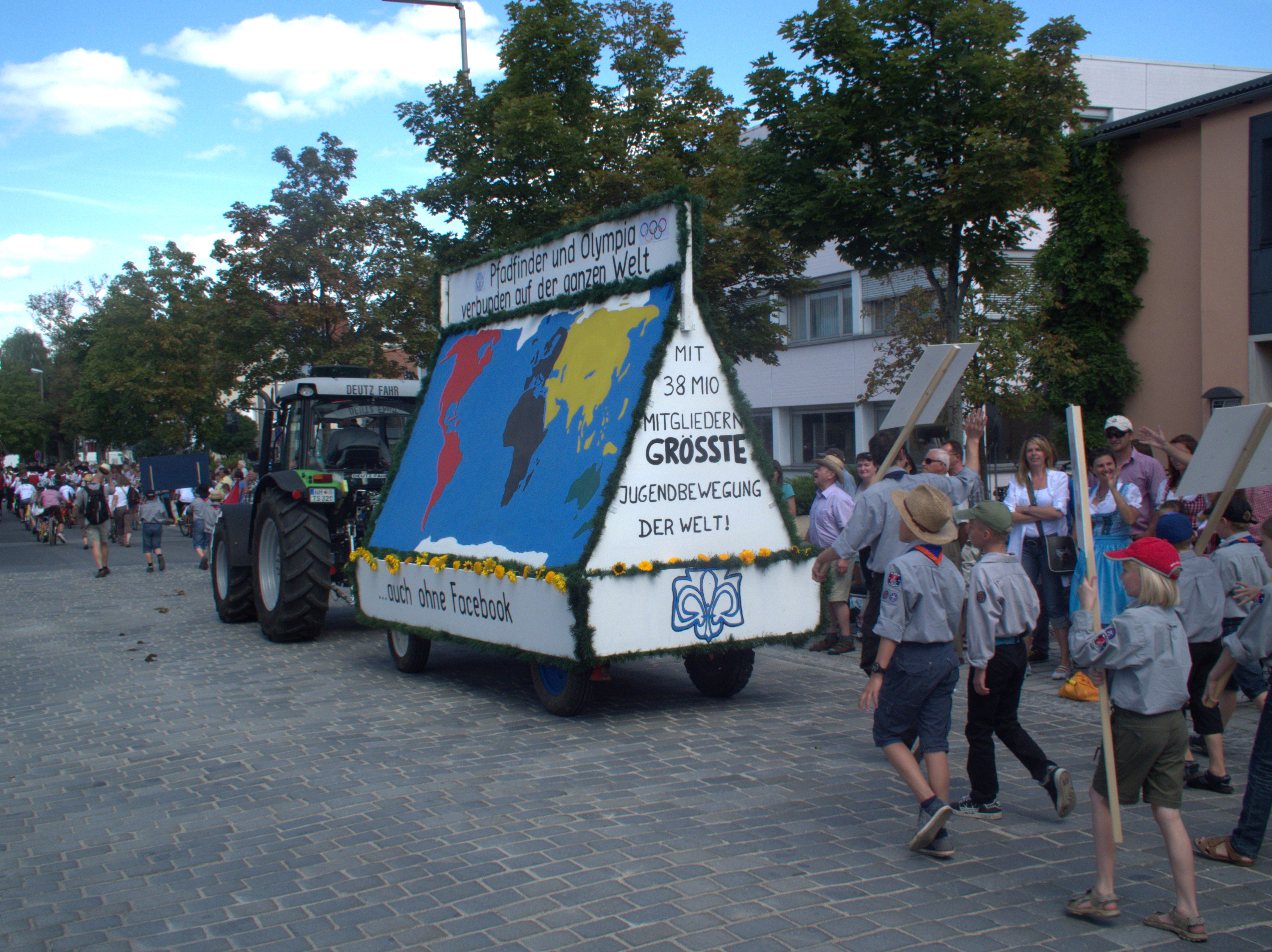 Festumzug am 12. August zum Juravolksfest 2012 in Neumarkt in der Oberpfalz, aufgenommen in der Bahnhofsstraße